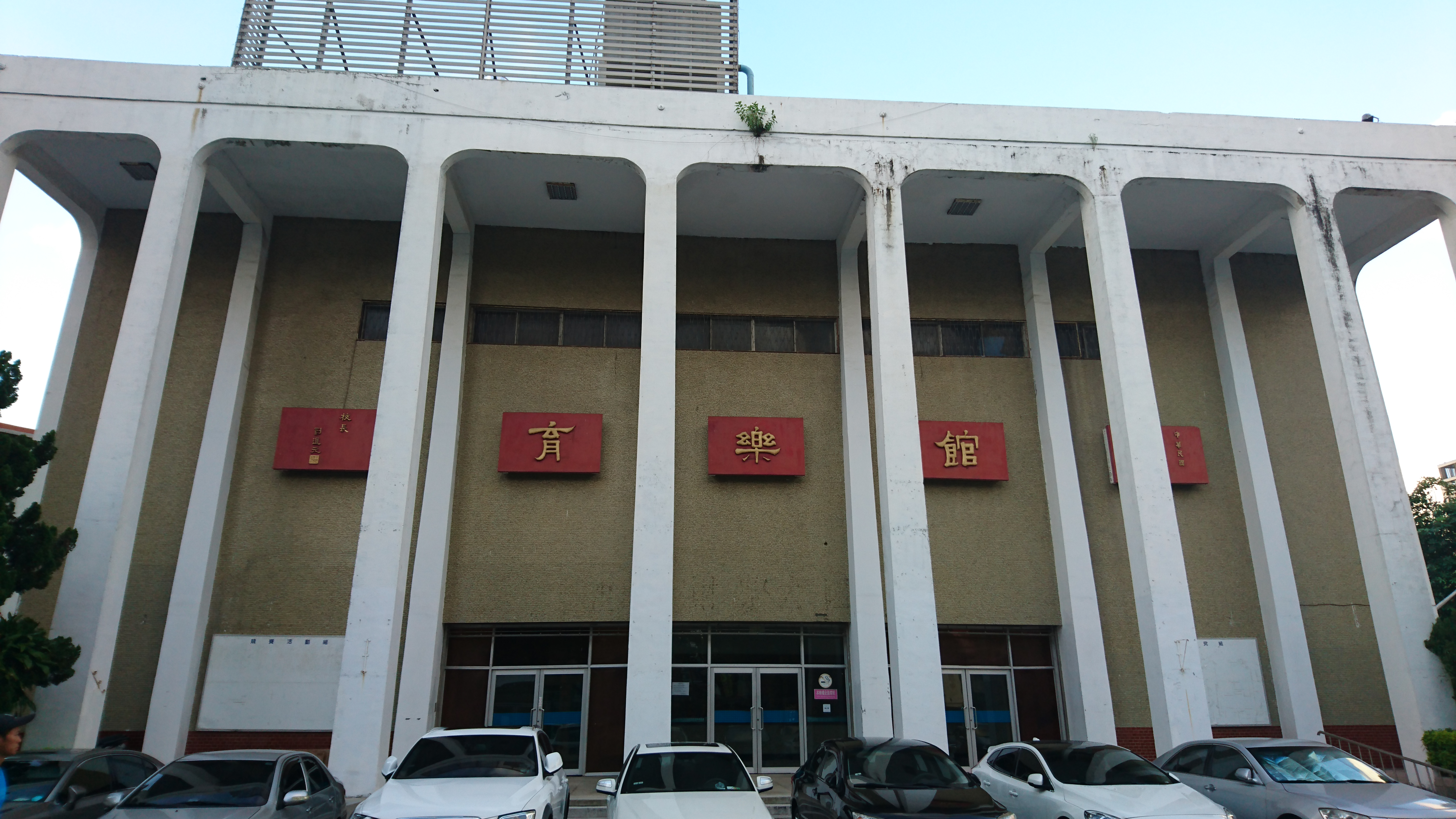 中文（台灣）: 國立臺北大學民生校區育樂館